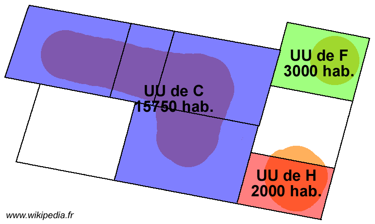 Schéma illustrant l'article sur la notion d'unité urbaine (5 sur 6)